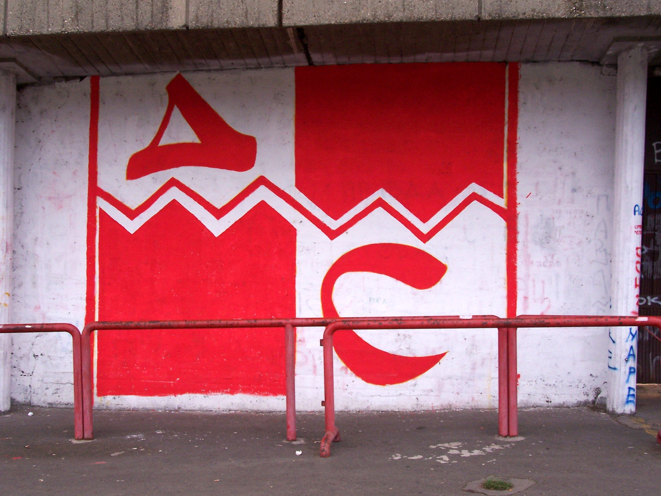 Delije Sever mural at the Stadion Crvena Zvezda in Belgrade